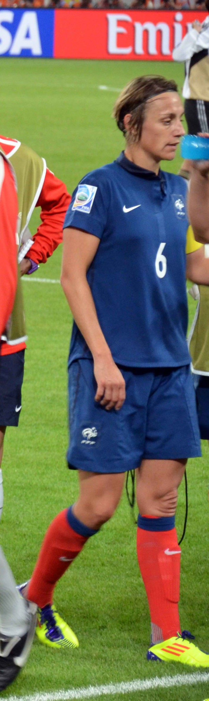 Sandrine Soubeyrand - Match de phase de groupes de la coupe du monde entre la France et l'Allemagne le 5 juillet 2011 au Borussiapark de Mönchengladbach